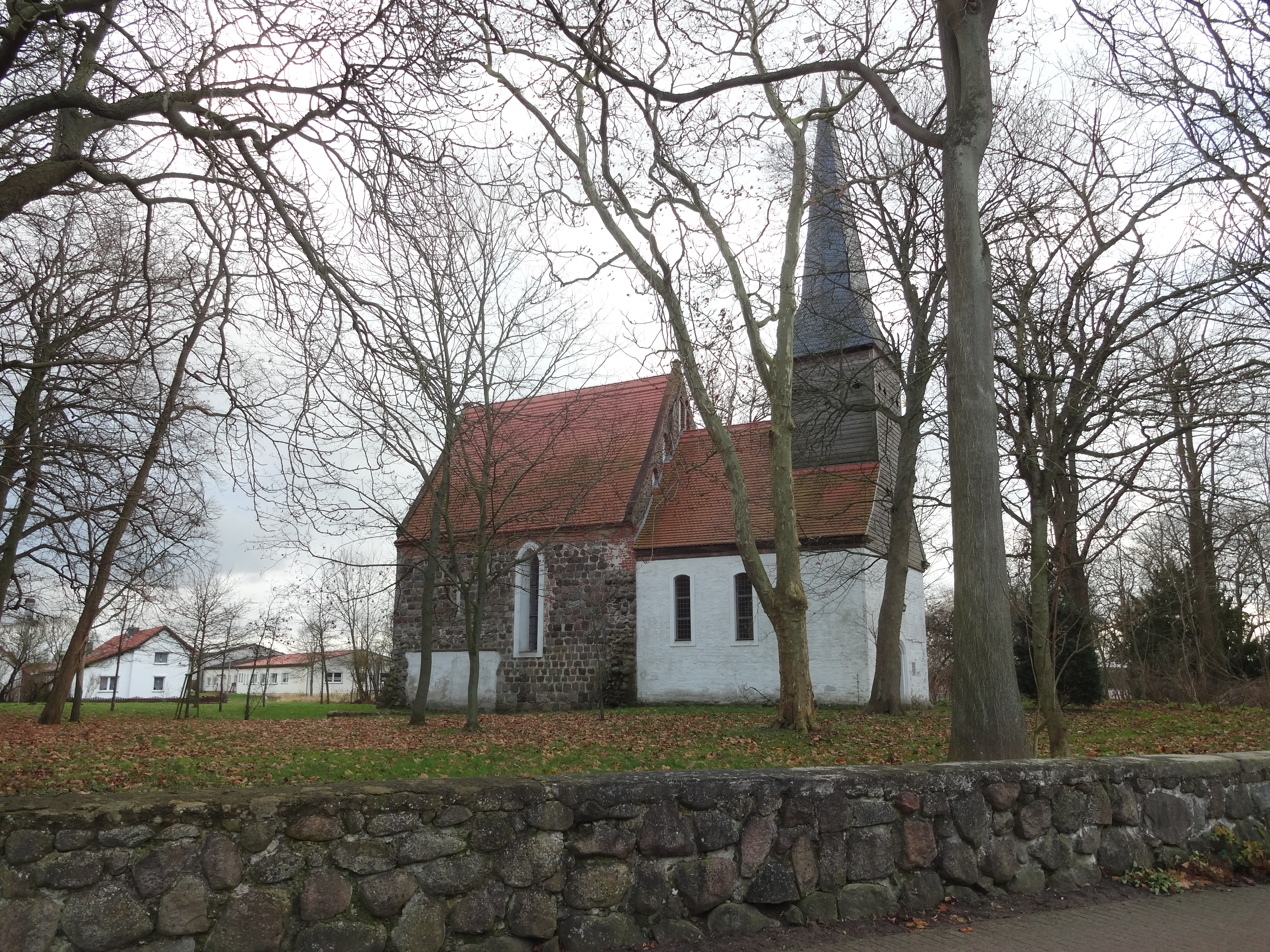 als Baudenkmal geschützte Kirche in Rollwitz, Landkreis Vorpommern-Greifswald